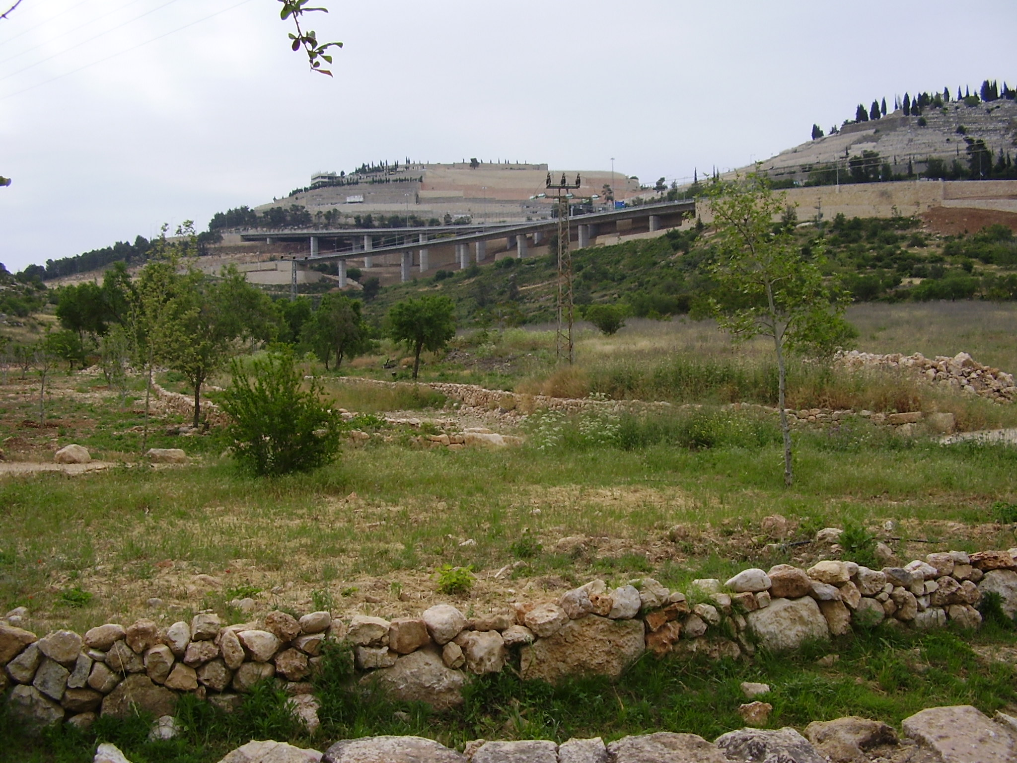 מבט מעינות תלם על גשרי כביש 1 ו- הר המנוחות נוצר על ידי משתמש:Avi1111